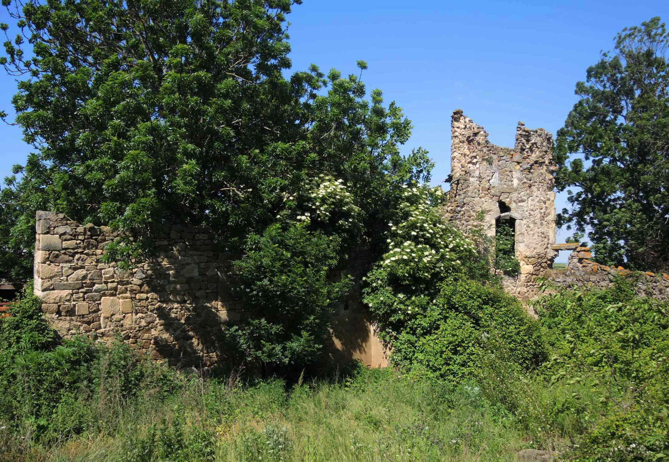 Bogy détail